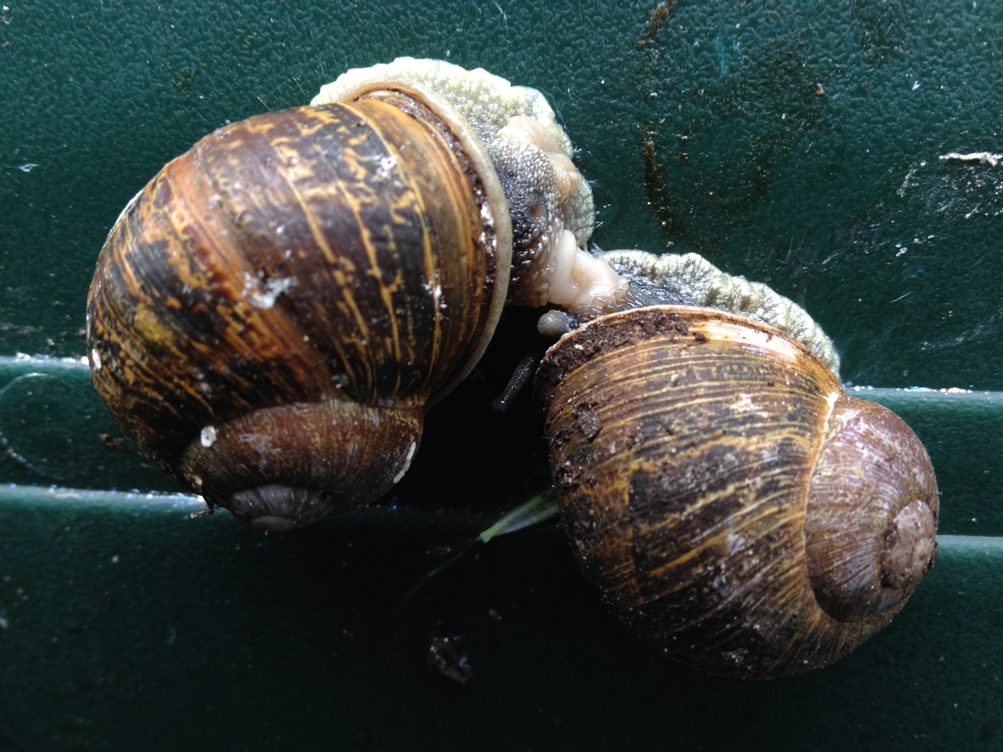 Ici nous pouvons observer un couple d'escargot en pleine reproduction. Ils sont hermaphrodite mais ne s'auto-féconde pas. L'accouplement dure environ 10h